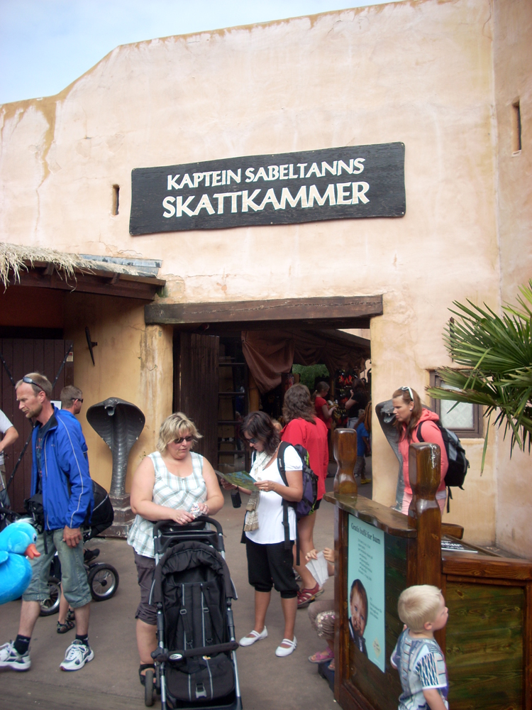 Kaptein Sabeltanns Skattkammer